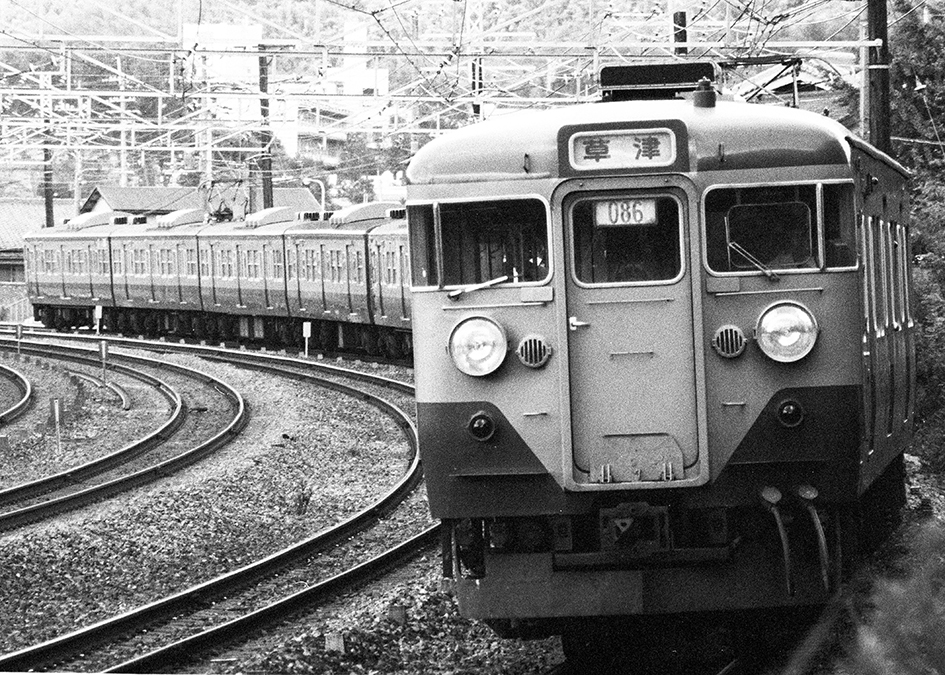 国鉄 113系電車 快速